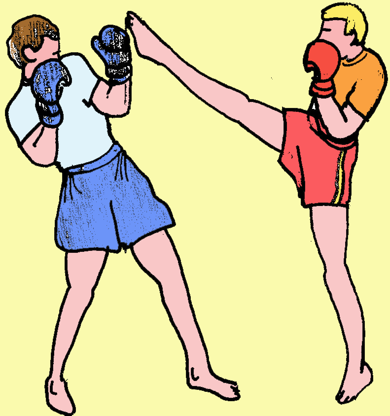 esquive_front2.jpg